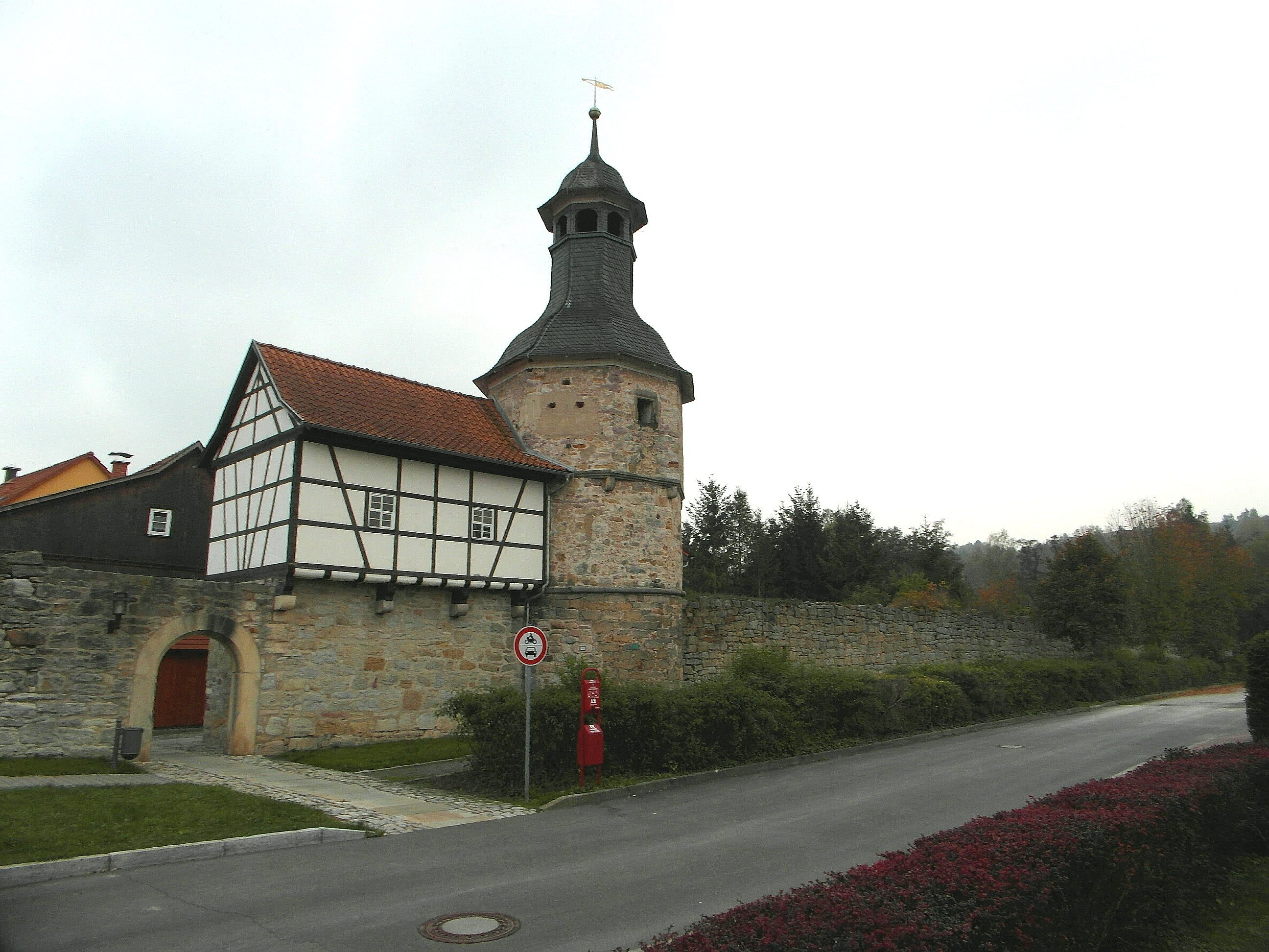 Mauerstraße Themar mit Hexenturm